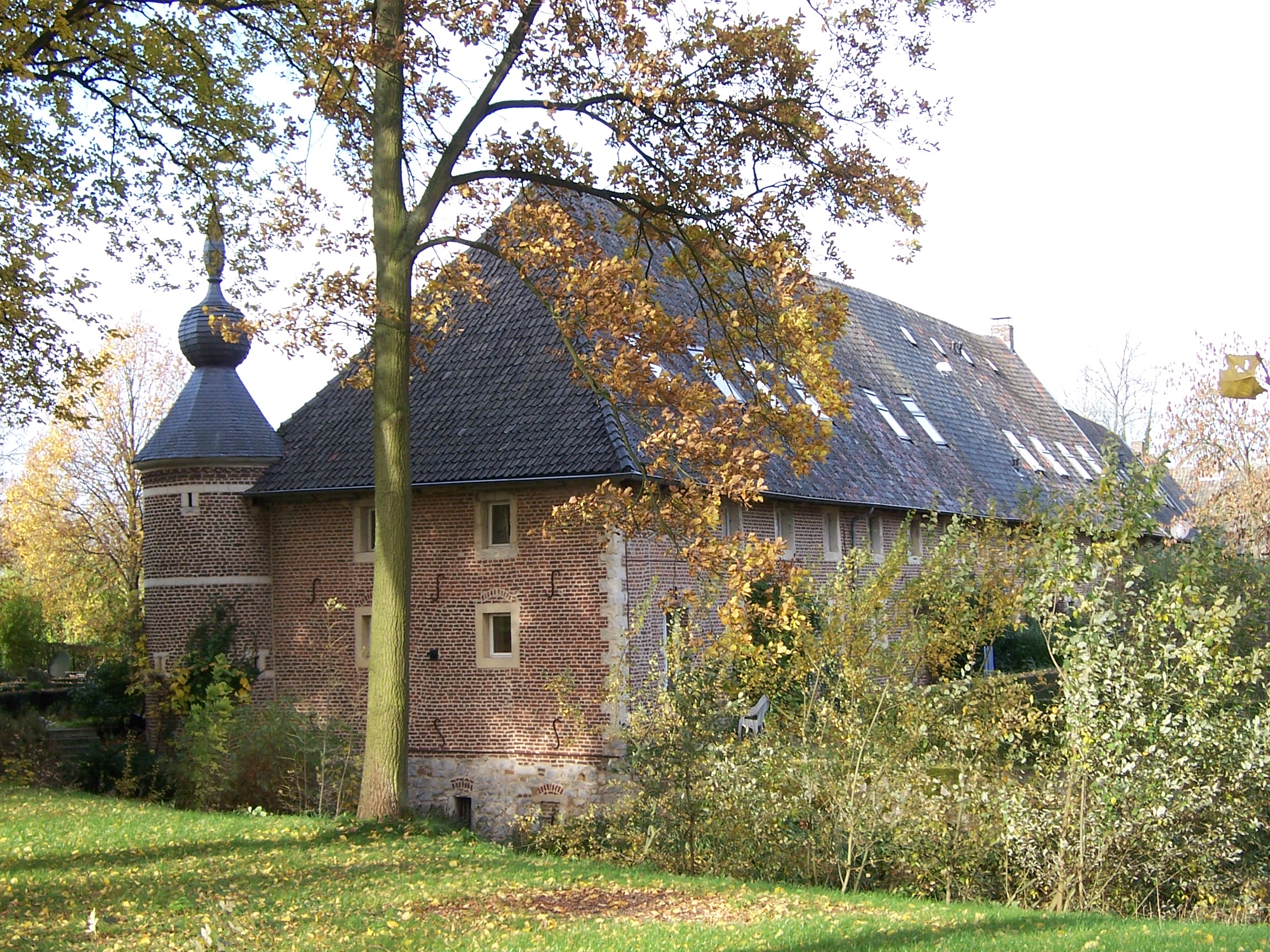 eigen foto kasteel van Lemiers